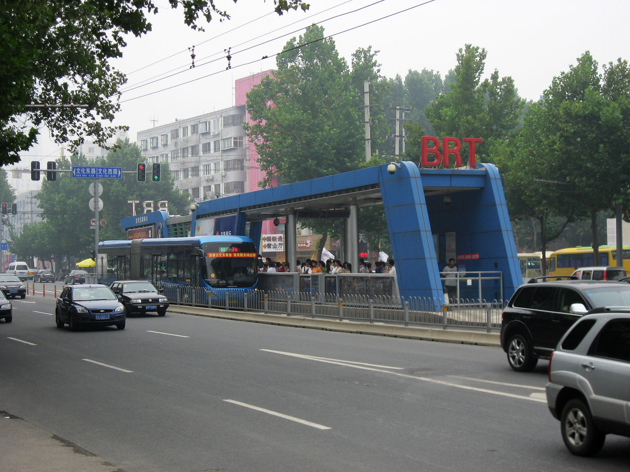 济南快速公交文化东路西口站及正在进站的BRT-3号线车辆